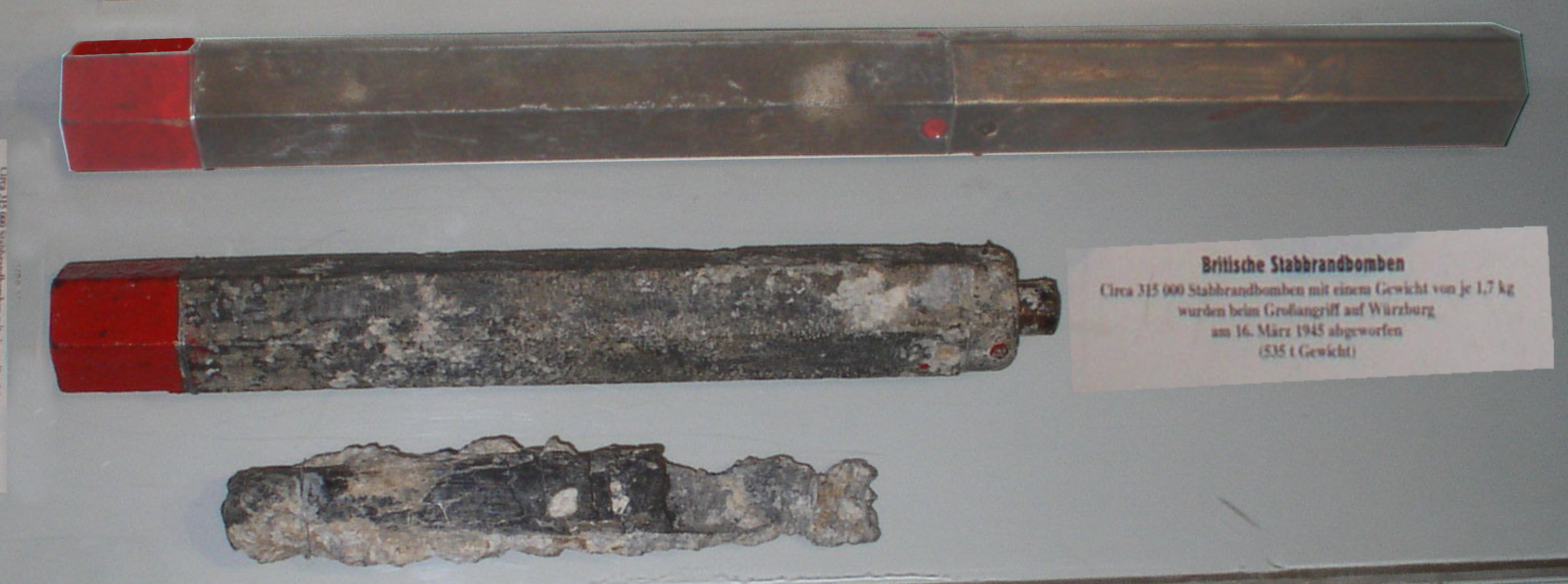 Britische Stabbrandbombe INC 4 LB (1,8 kg), Oben: Abwurfobjekt. - Mitte: Blindgänger. - Unten: Reste eines ausgebrannten Brandstabs